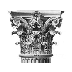 כותרת קורינתית